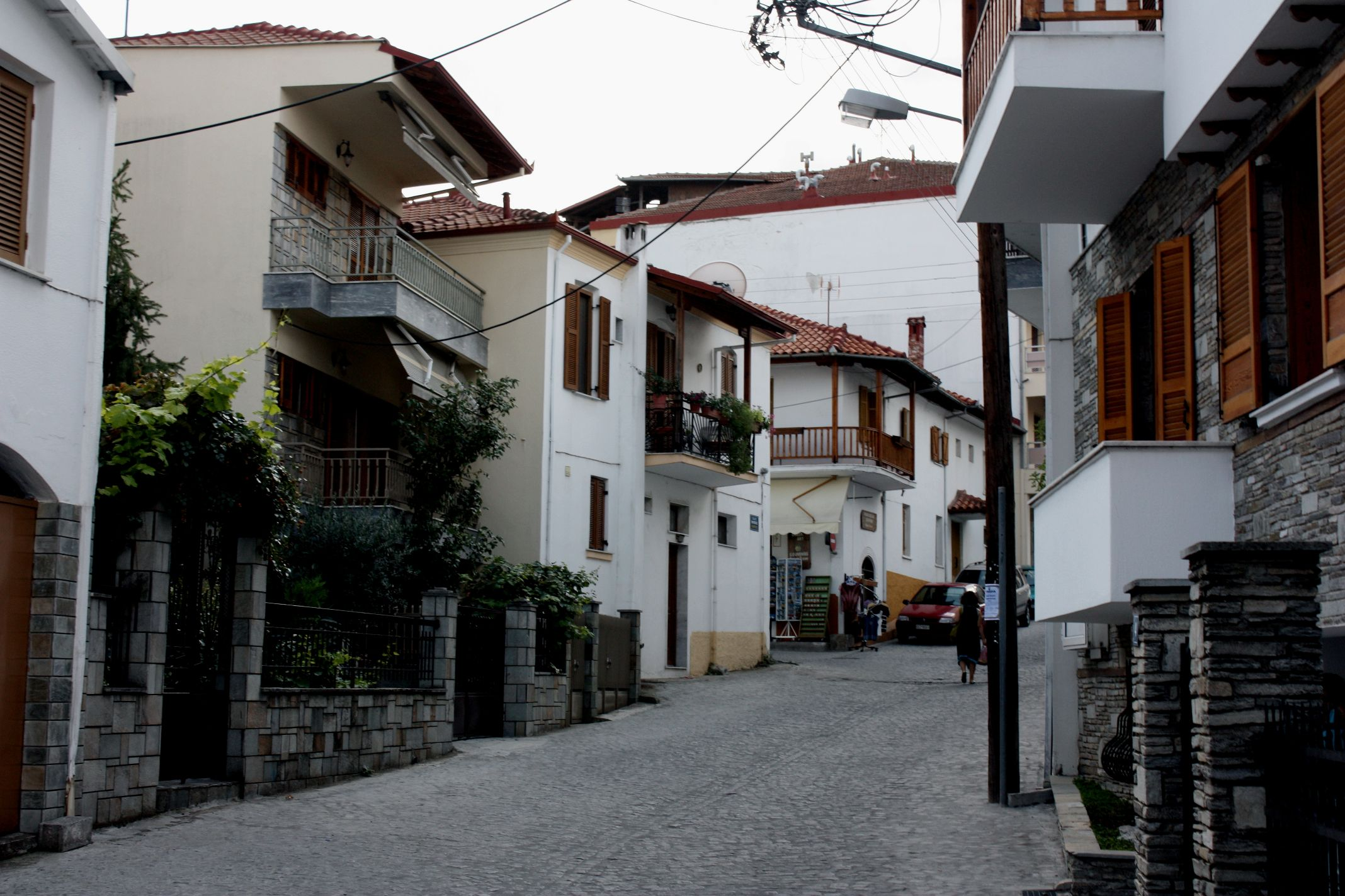 Eine Gasse in Litochoro